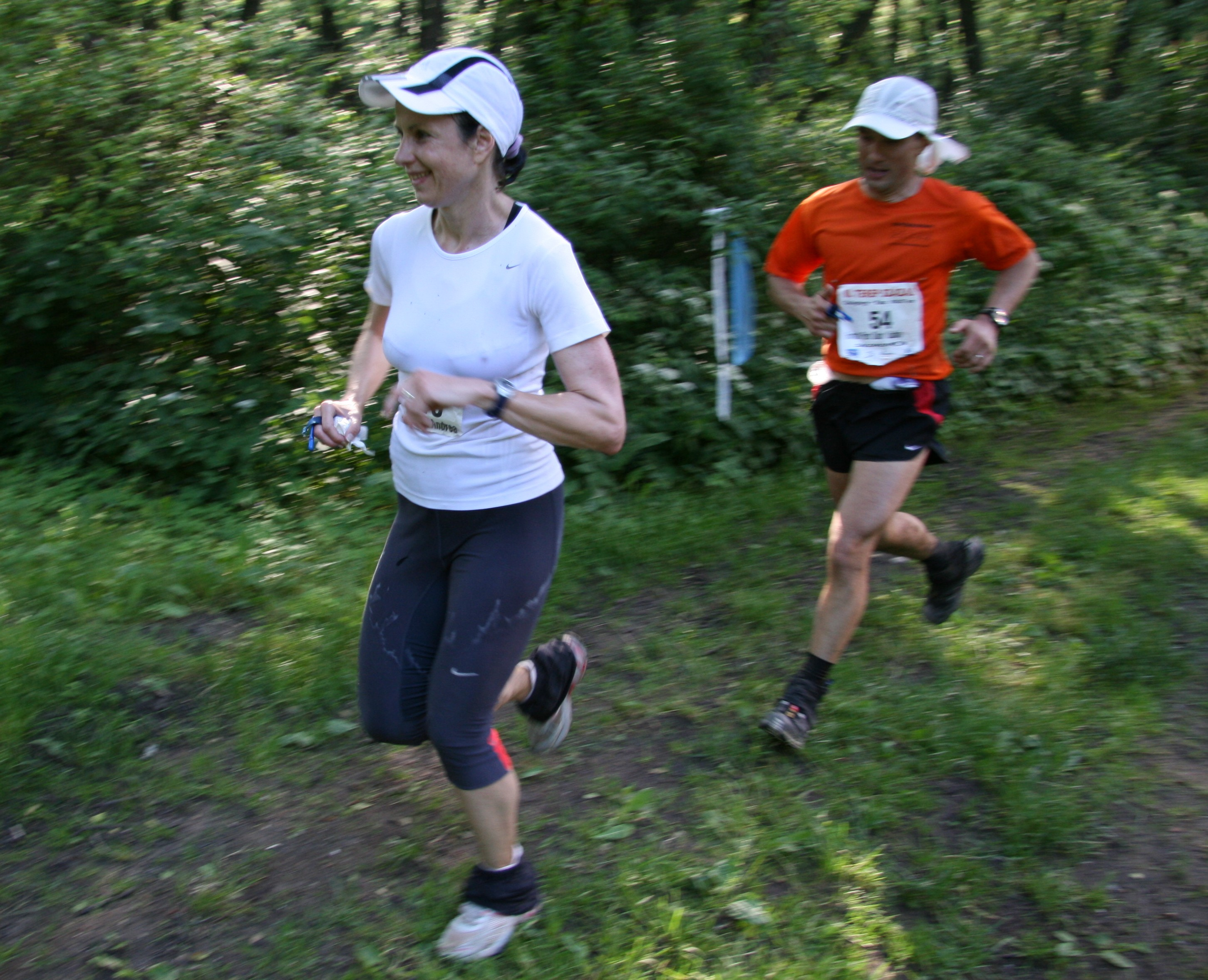 Balogh Andrea ultramaratonista a 2008-as, általa megnyert Terep Százason (Magyarország)